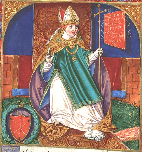 Zdzisław Archbishop of Gniezno on book illumination